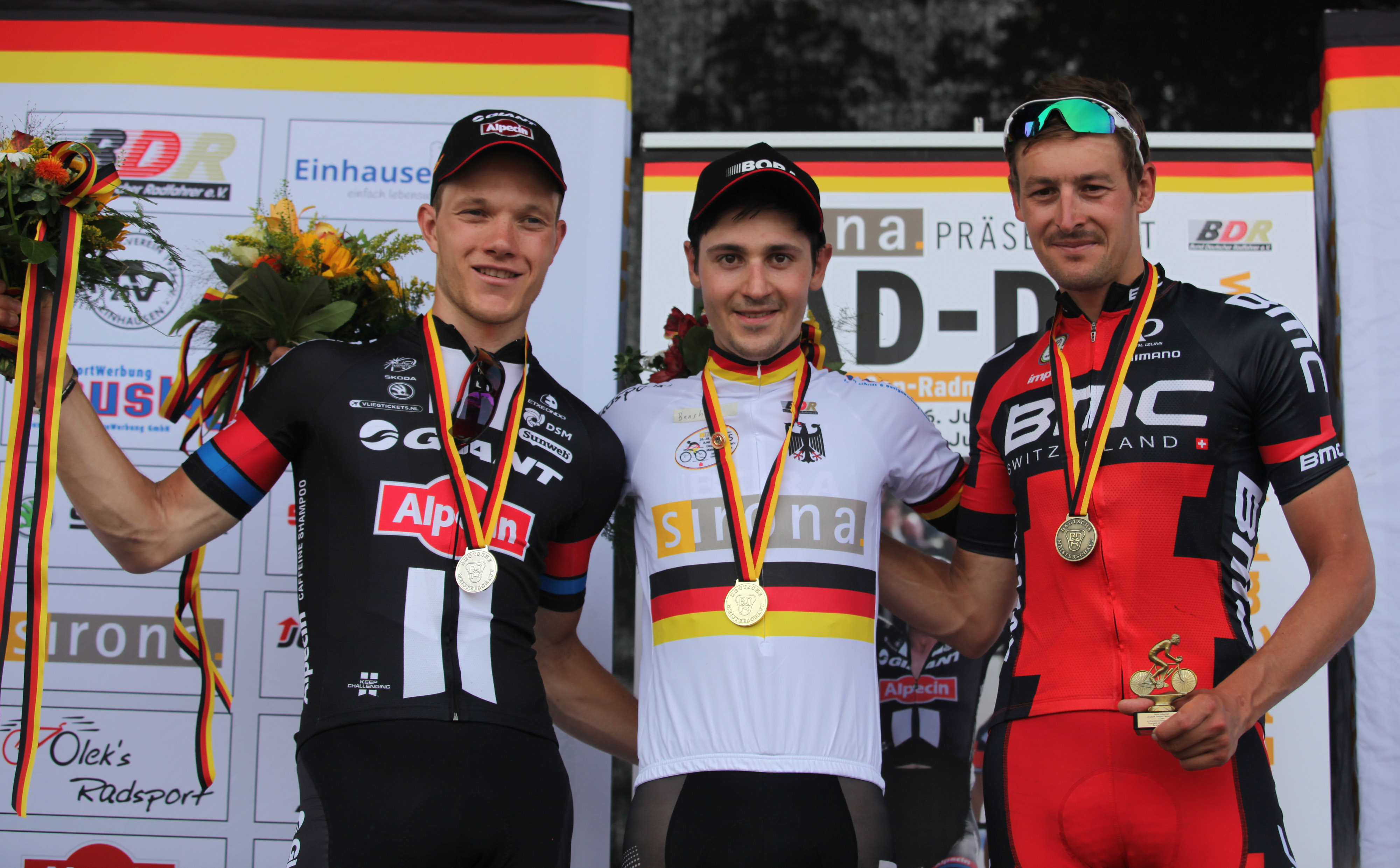 Nikias Arndt, Emanuel Buchmann und Marcus Burghardt bei der Siegerehrung. Foto von den Deutschen Meisterschaften im Straßenrennen der Männer (Elite) am 28. Juni 2015 in Bensheim (Hessen)